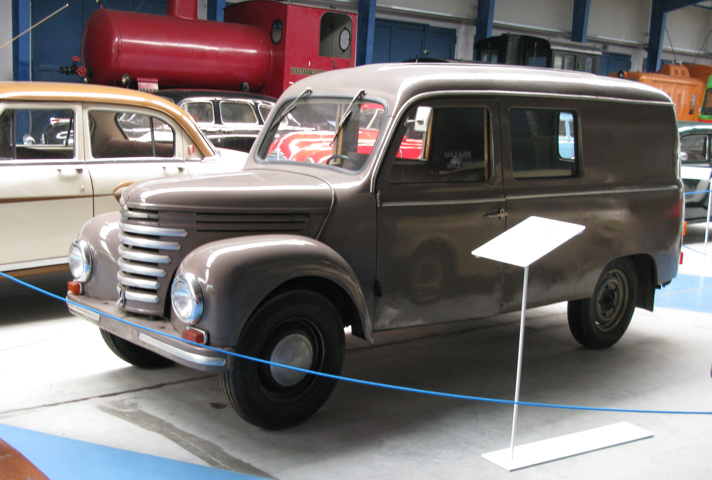 Framo V901